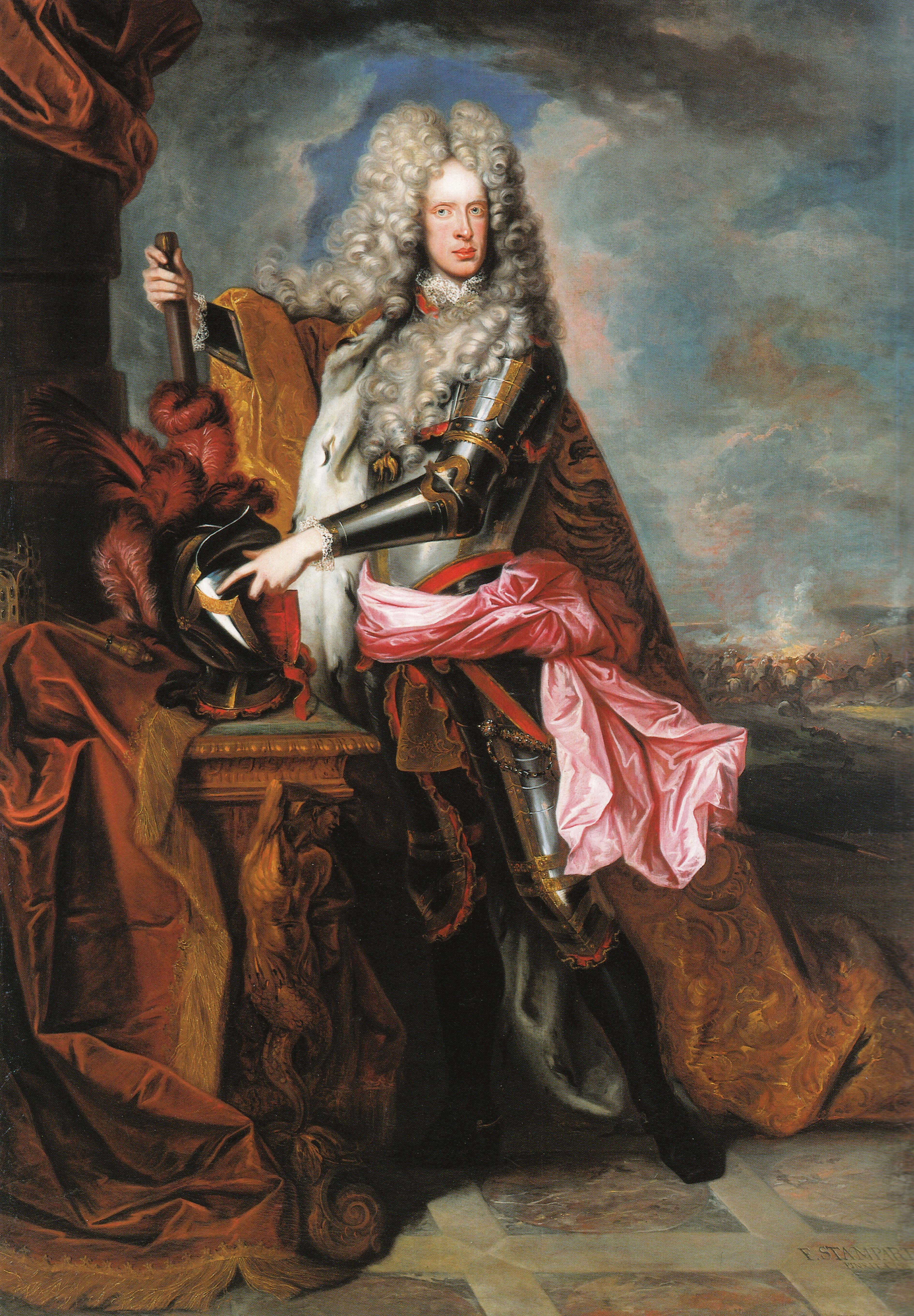 Ölgemälde von Kaiser Joseph I. mit Harnisch und Feldherrenstab vor einer Schlachtenszene.